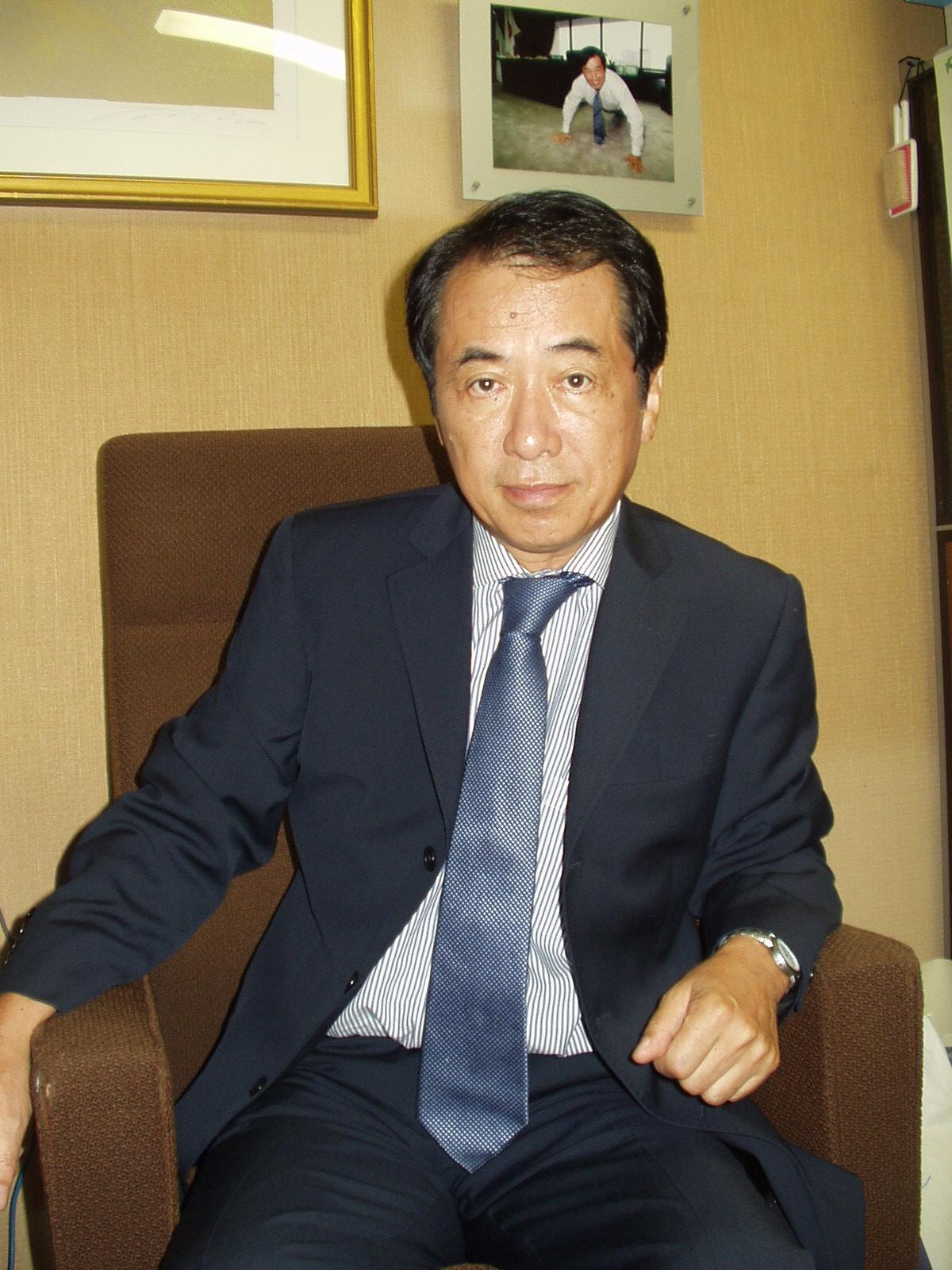 KAN Naoto à son bureau de la Chambre des représantans à Tokyo